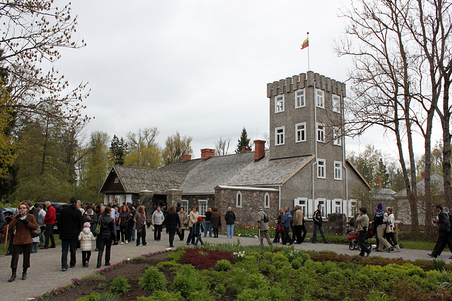 Burbiškio dvaras.